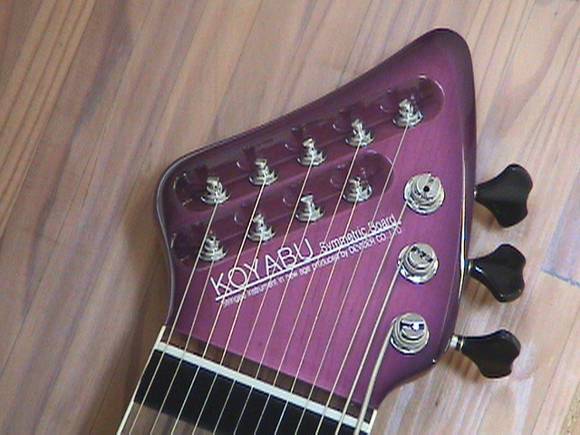 koyabu board ai head